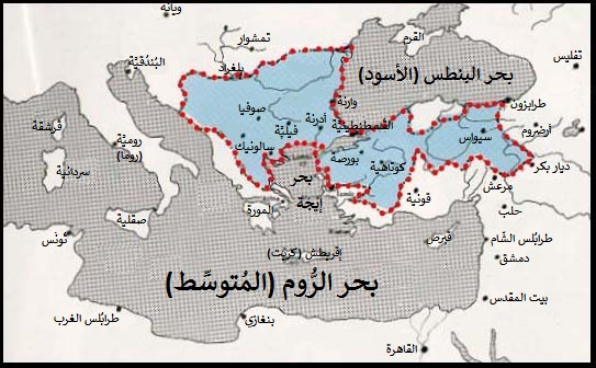 الحُدود التقريبيَّة لِلدولة العُثمانيَّة زمن السُلطان بايزيد الأوَّل.